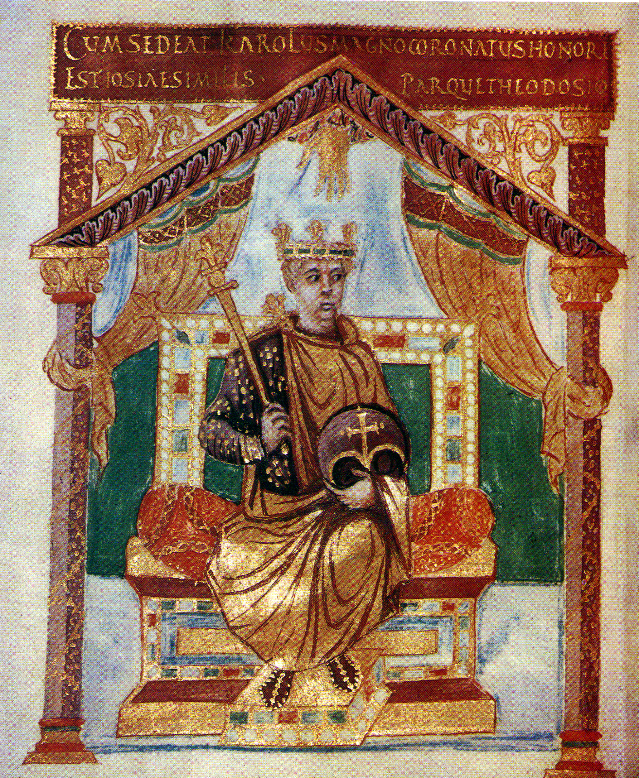 Psautier de Charles le Chauve, copié par Liuthard.